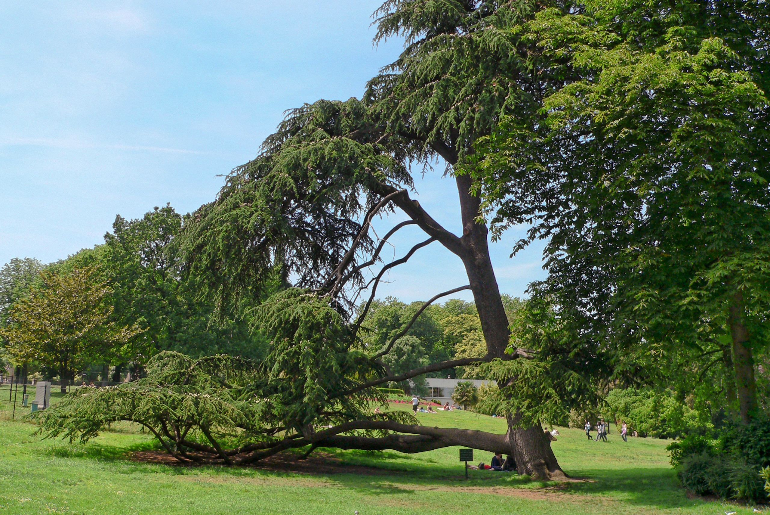 Les arbres du parc Montsouris, cèdre du Liban (cedrus libani), XIVe arrondissement, Paris, France